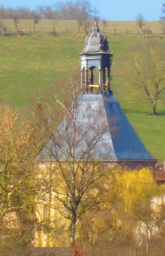 Luneville adomenil chapelle